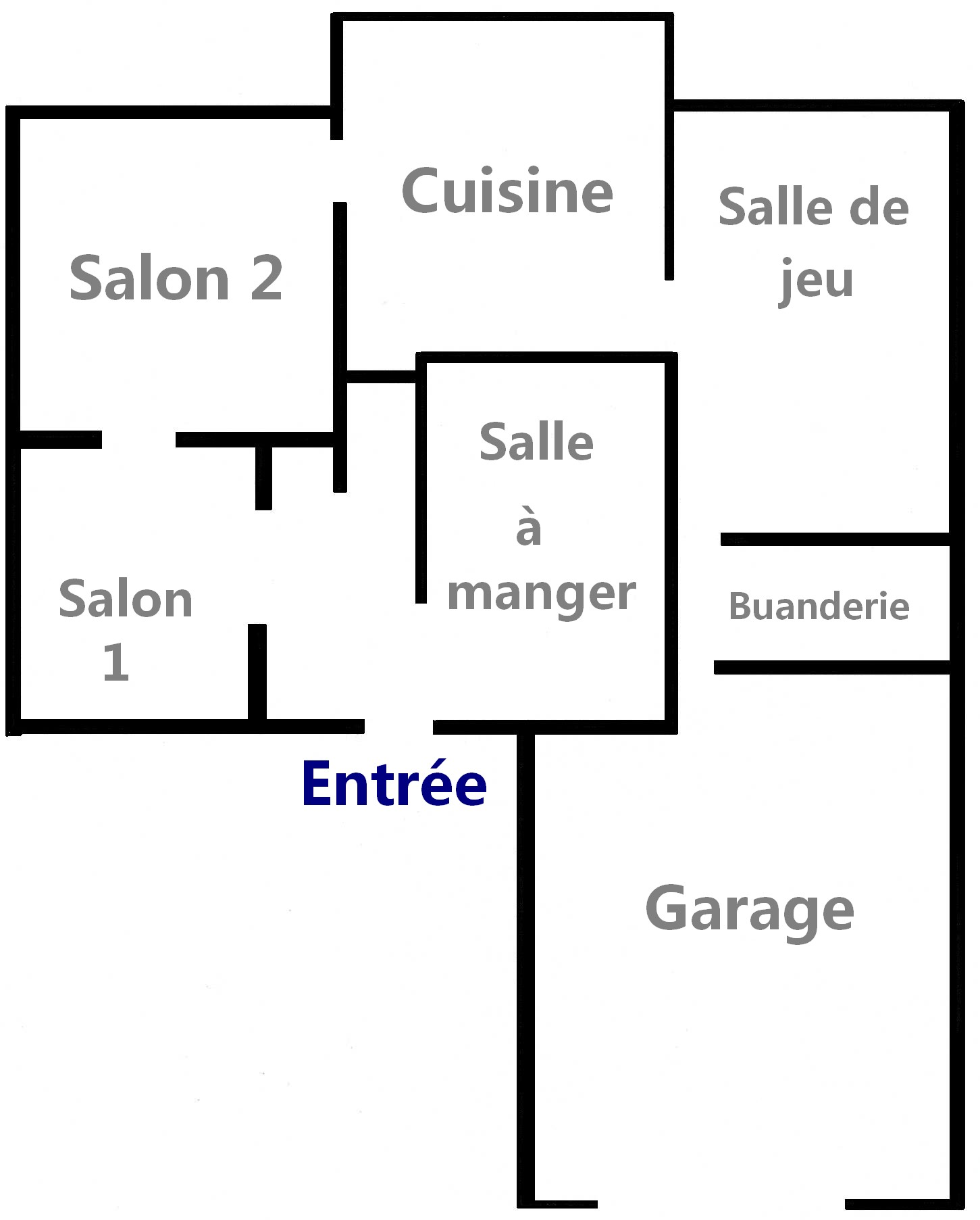 Plan de la maison de la famille Simpson (cf la série télévisée animée "Les Simpson"; "The Simpsons" en anglais)